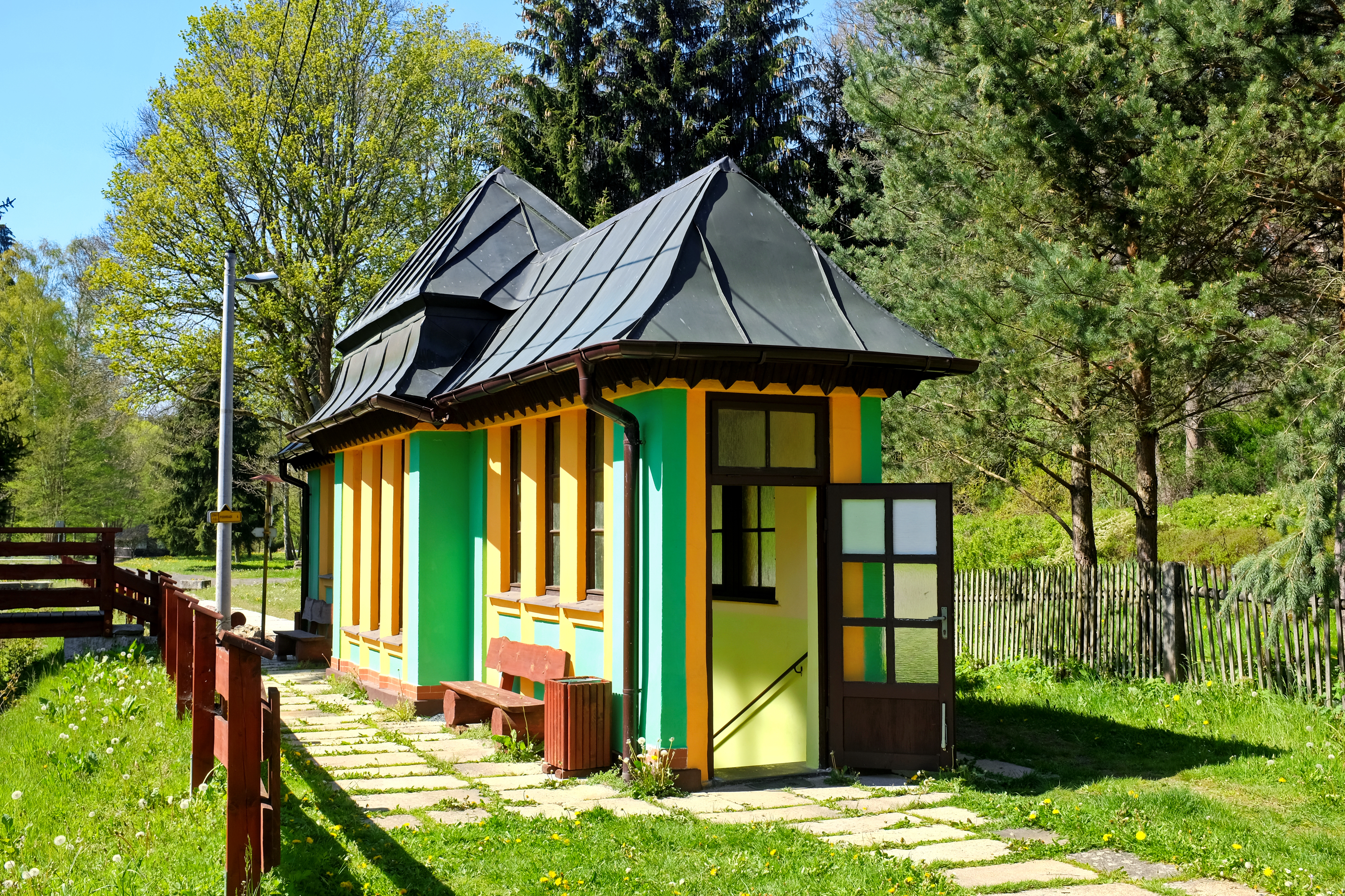 Minerální pramen v Dolních Pasekách, Smrčiny, okres Cheb